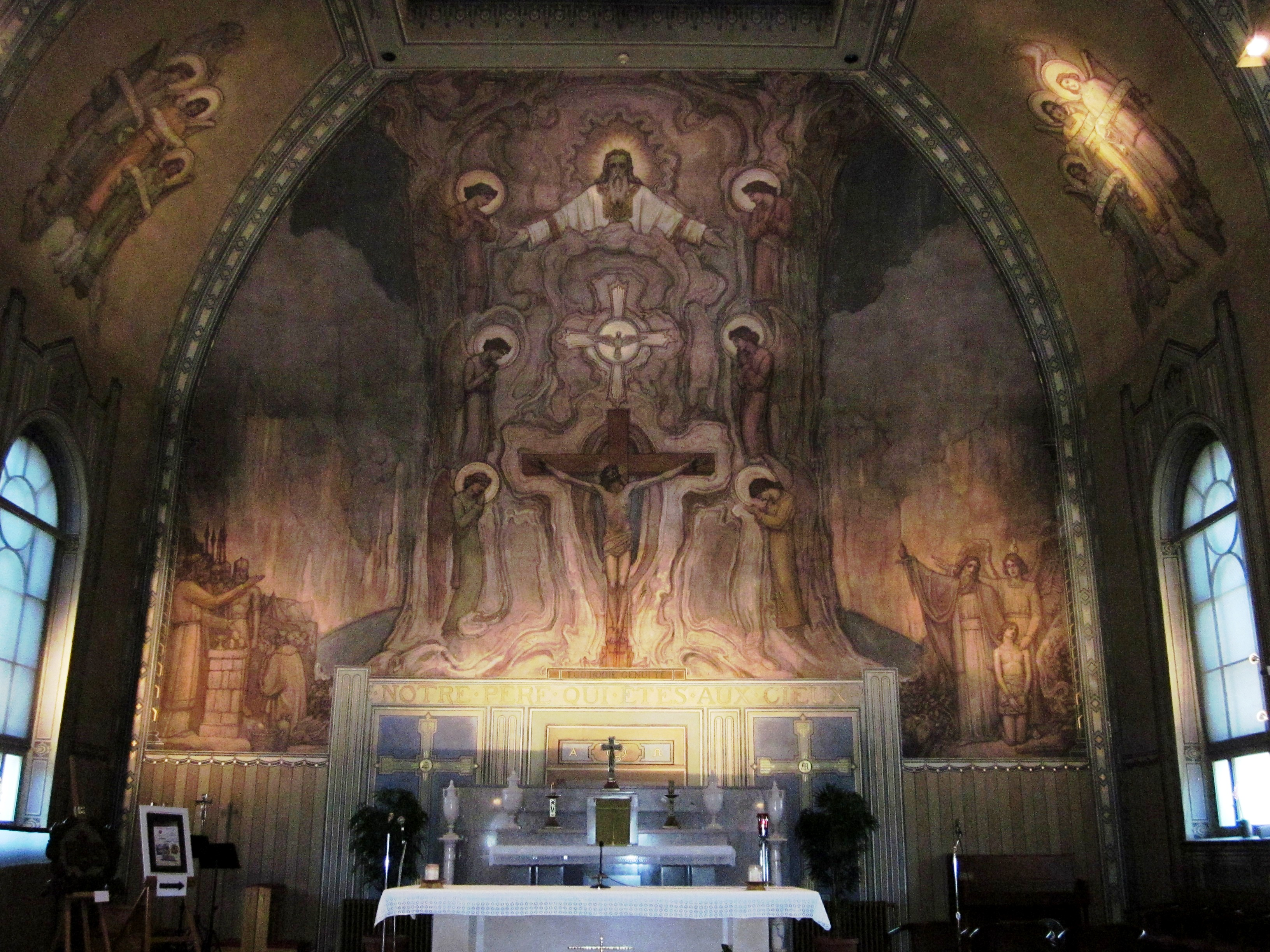 La Gloire Divine (1944-1947), huile sur toile marouflée, dans l'église Notre-Dame-de-la-Présentation